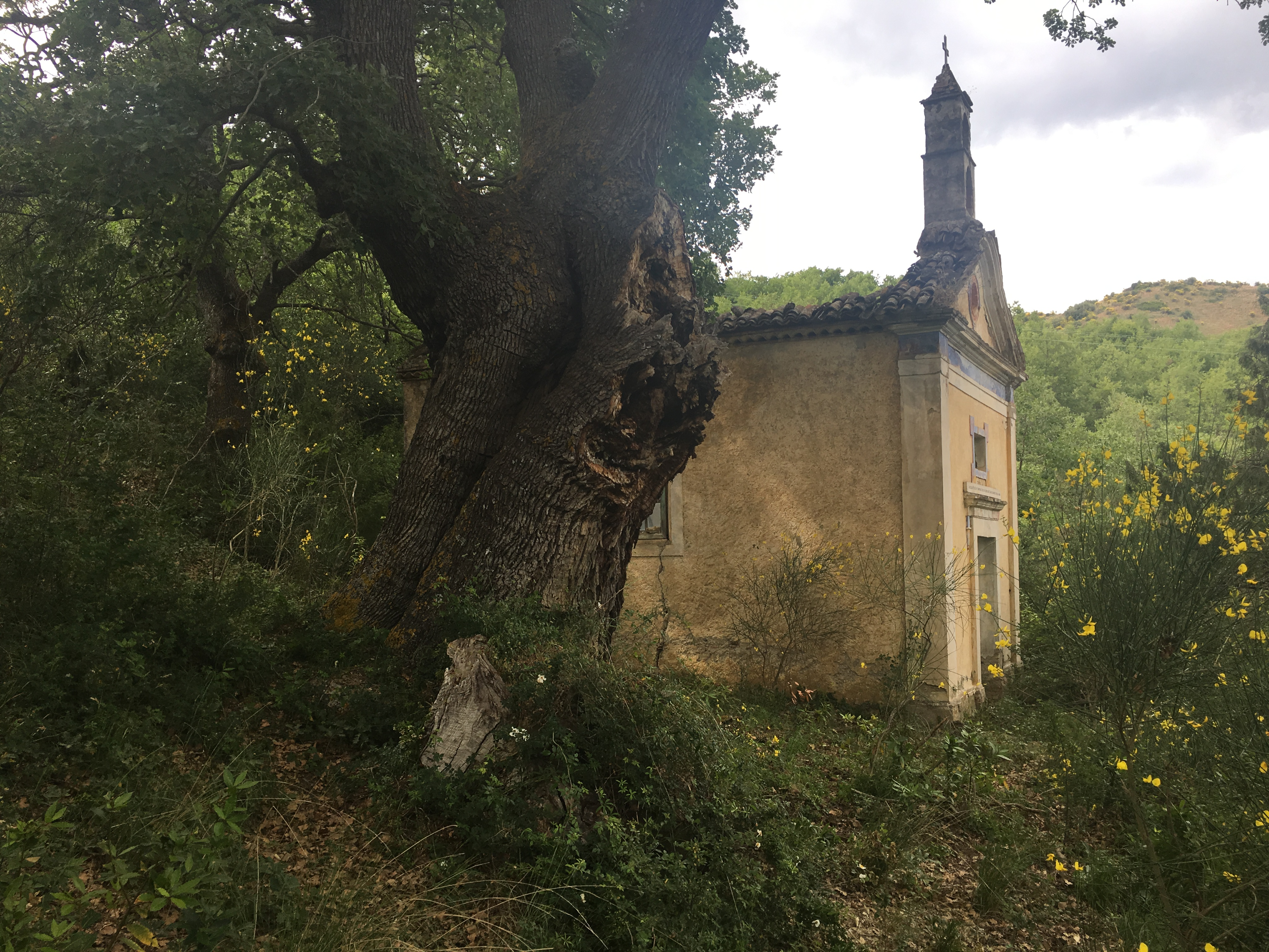 Facciata esterna della Cappella di Sant'Onofrio.